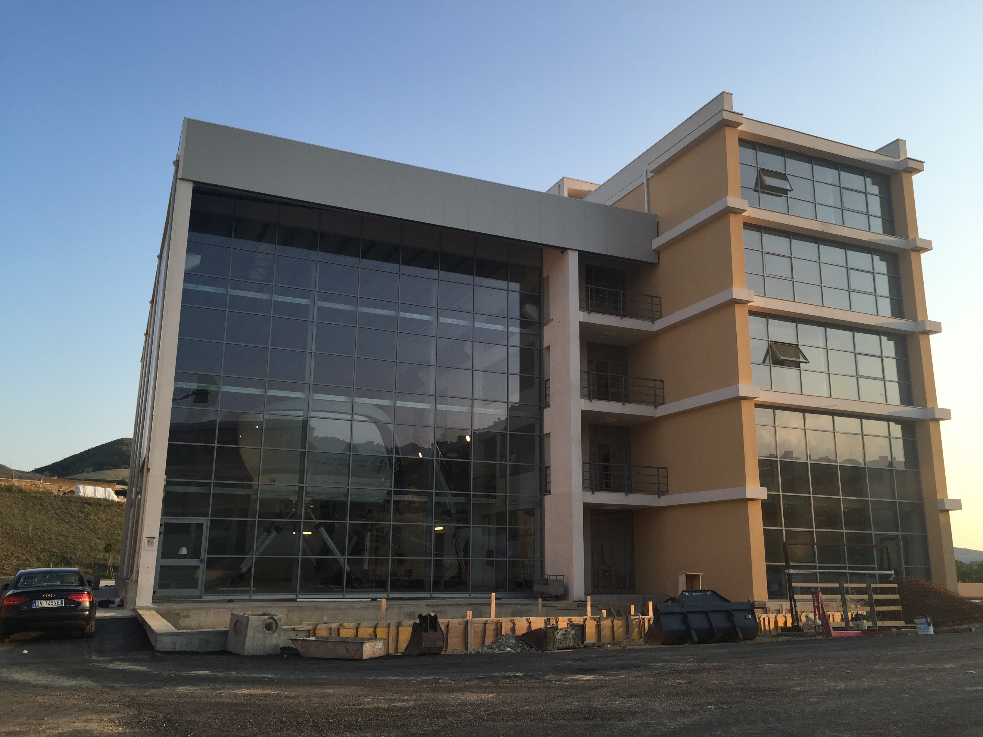 Uno degli edifici del Polo scientifico dell'Università Kore. Qui è installato l'unico simulatore di volo presente in una università europea.